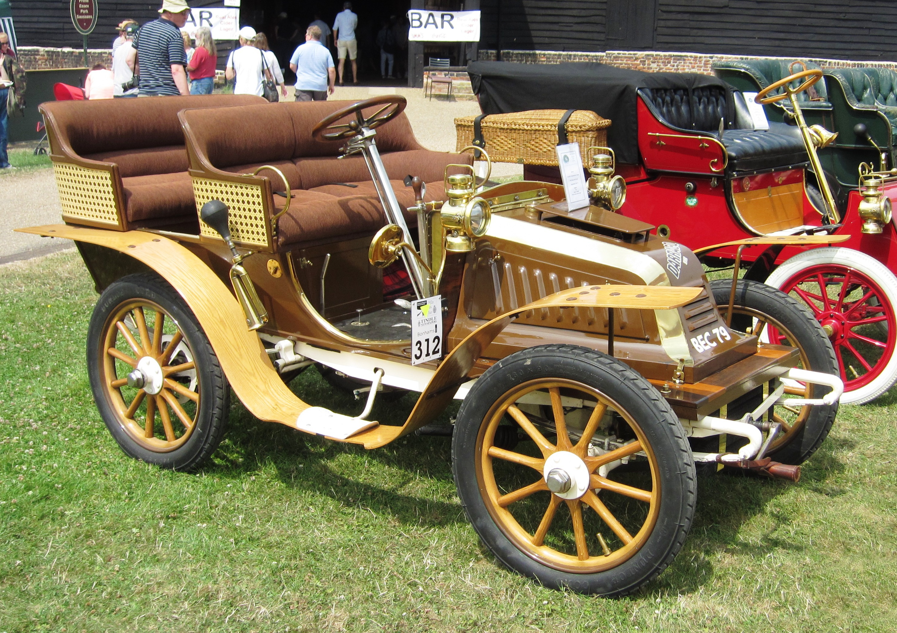 Darracq (1902) 9 CV single cylinder sliding-seat tonneau. source of information